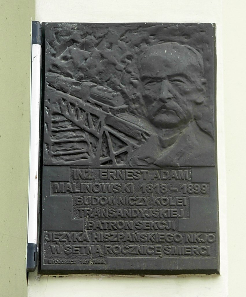 Tablica pamiątkowa na kamienicy ul. Dworcowa 60 w Bydgoszczy